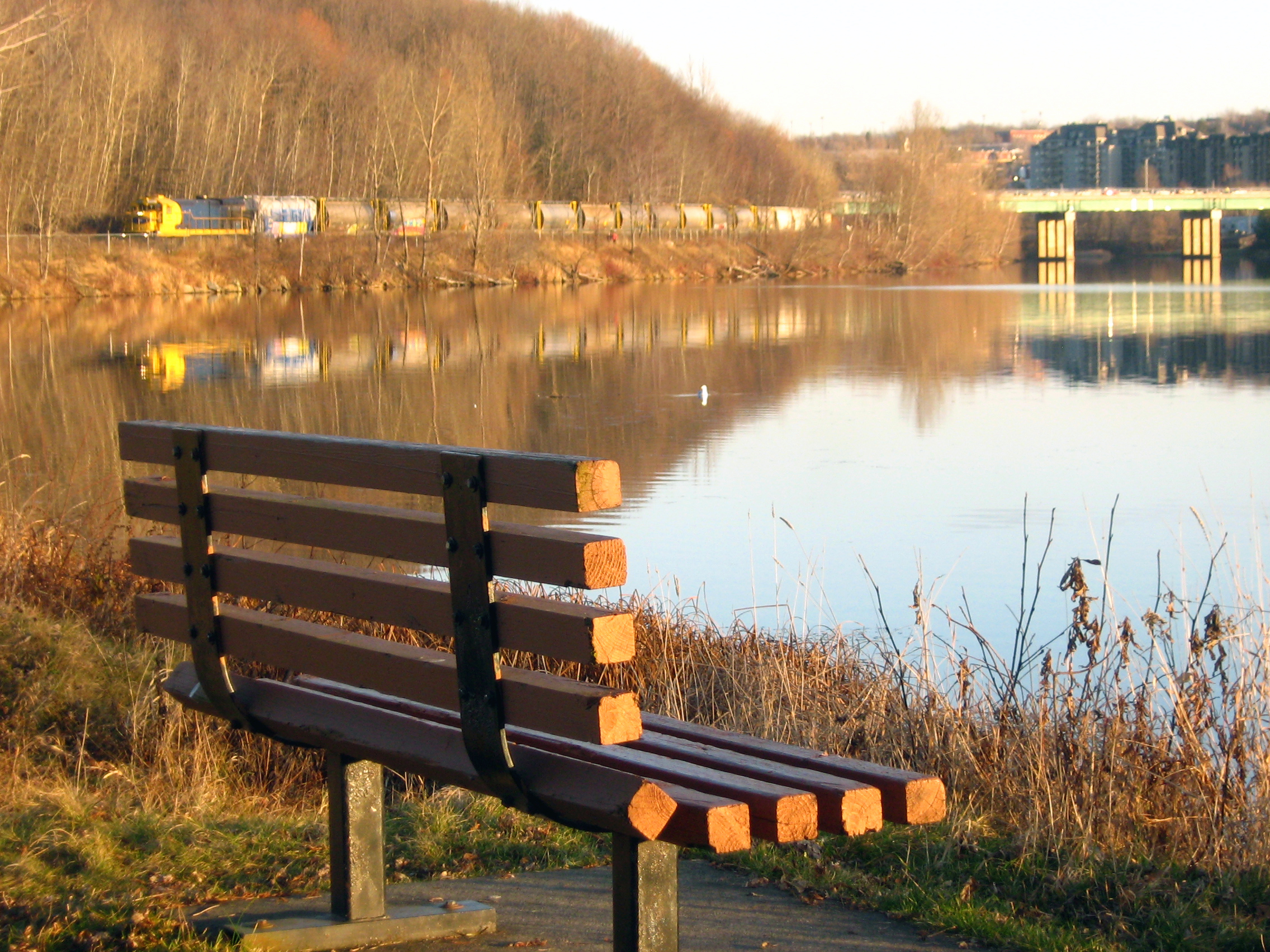 Rivière Magog a l'entrée de Sherbrooke